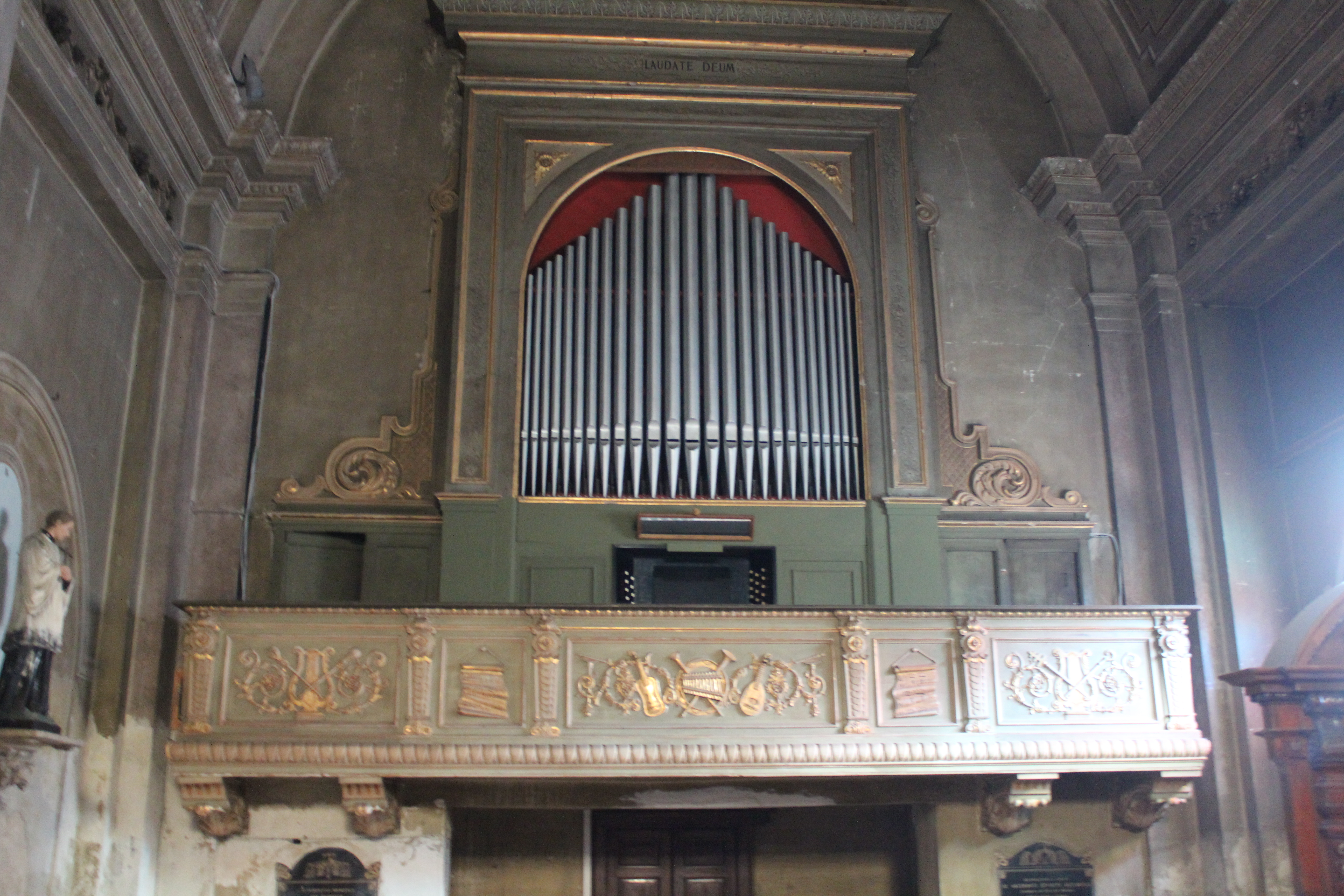 Organo Canne nel Santuario San Martino in Balsamo